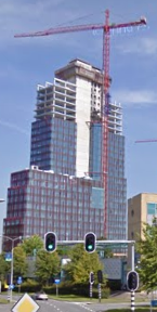 De Carlton in aanbouw.